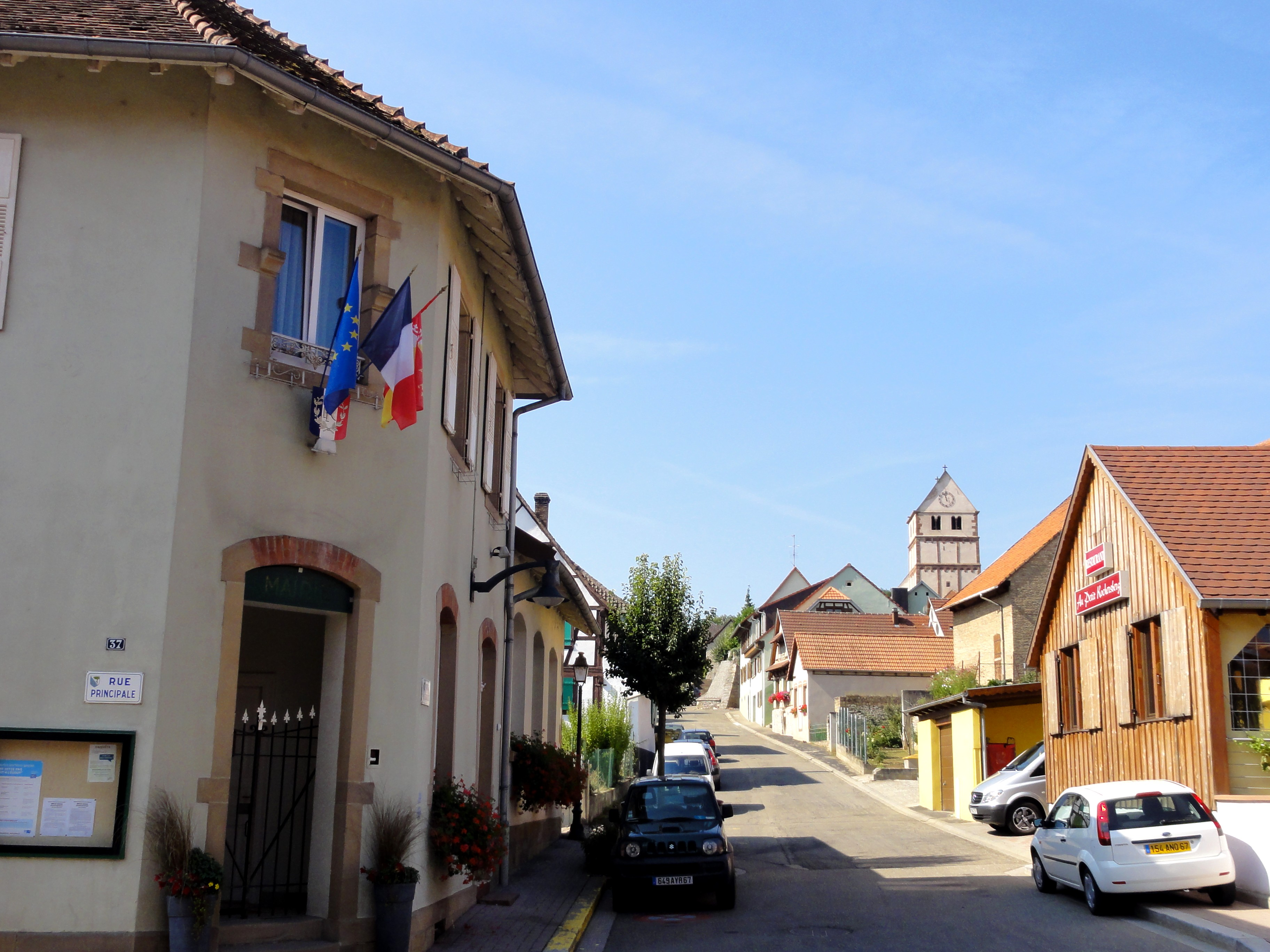 Alsace, Bas-Rhin, Willgottheim, Mairie et rue de l'église.